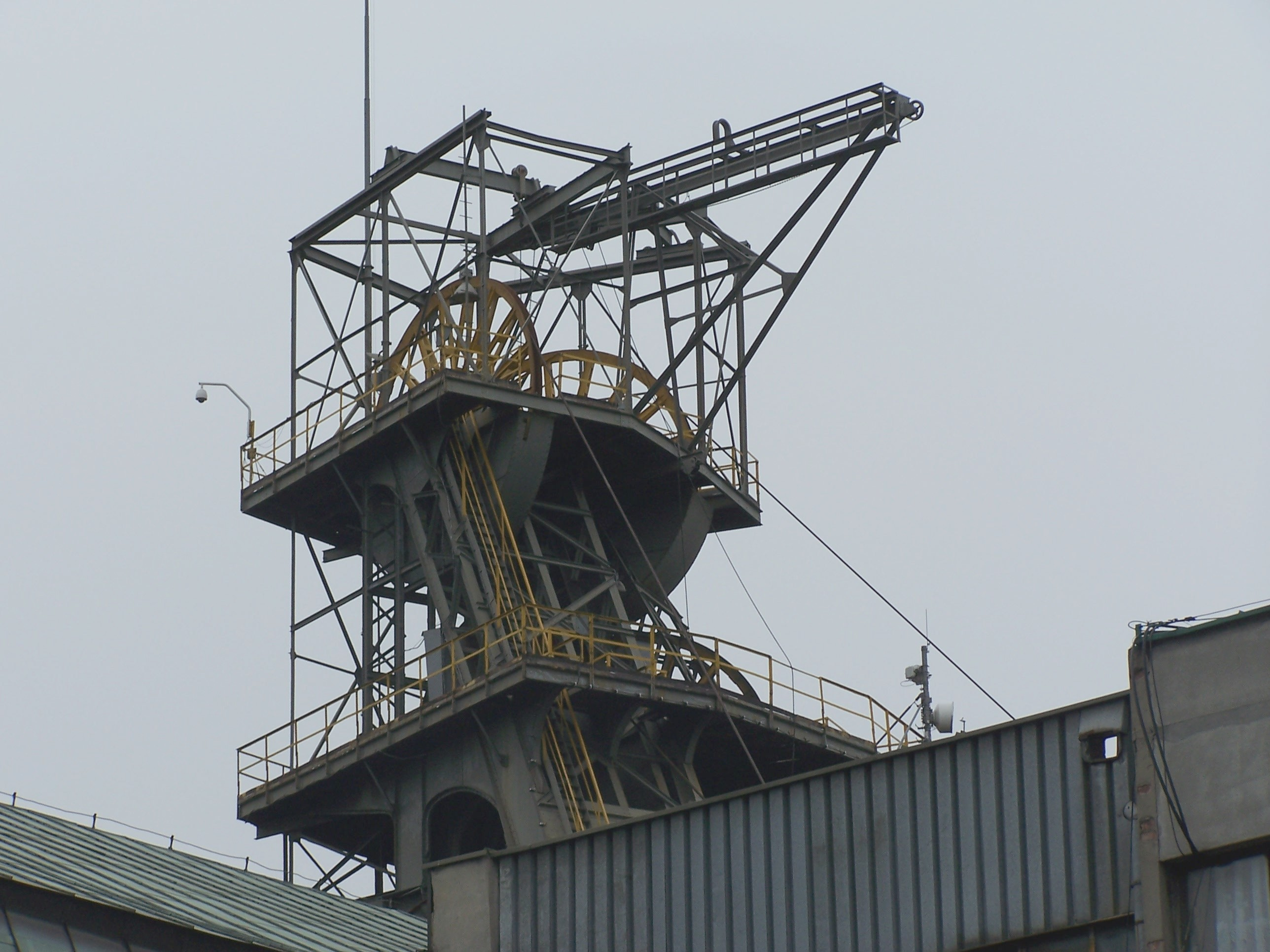 Description:Kopalnia "Wieczorek" szyb Pułaski. Zdjęcie mojego autorstwa. Author: Ewkaa